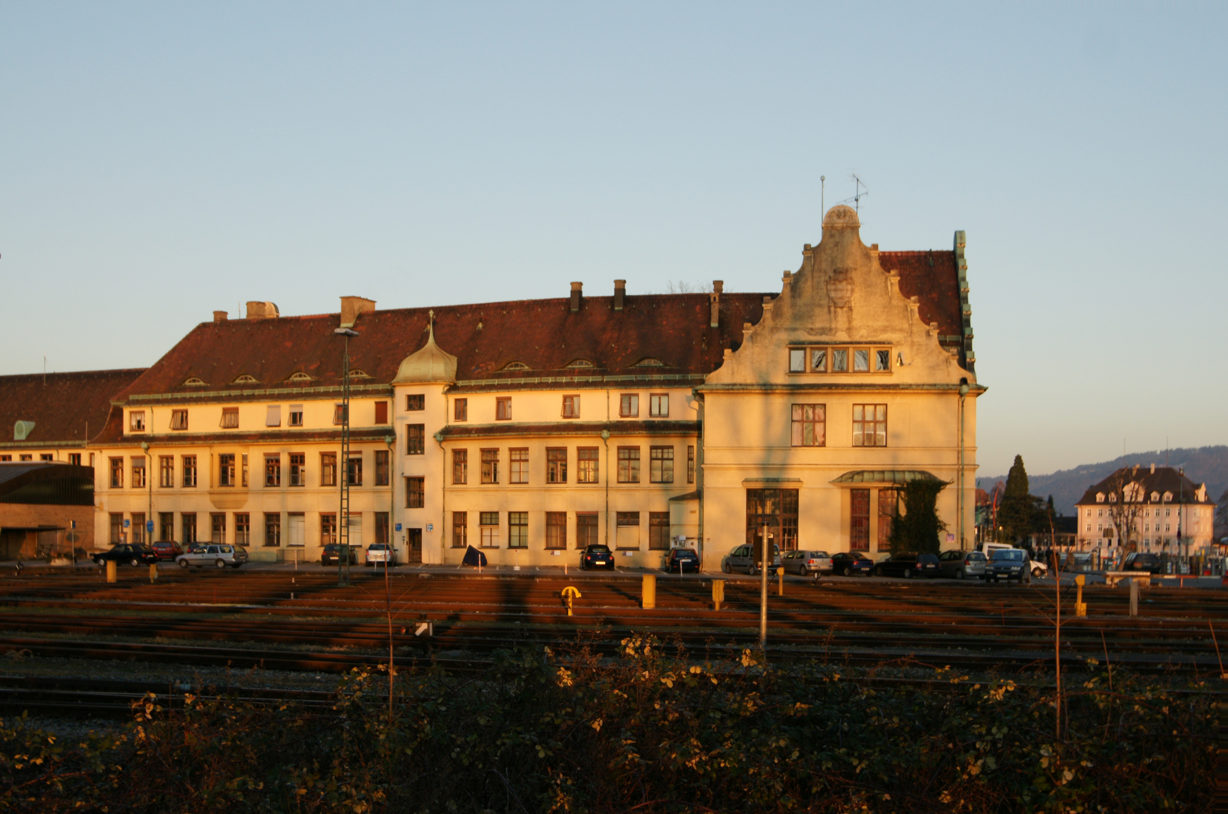 Der Hauptbahnhof von Lindau am Bodensee: mehrflügelige Anlage mit Satteldächern und Quergiebeln, an der Front zur Altstadt Terrassenvorbauten und übergiebelter Eingangsrisalit, im barockisierenden Heimatstil von E. Henke, 1913-22. Im Hintergrund rechts das Finanzamt. This is a photograph of an architectural monument.